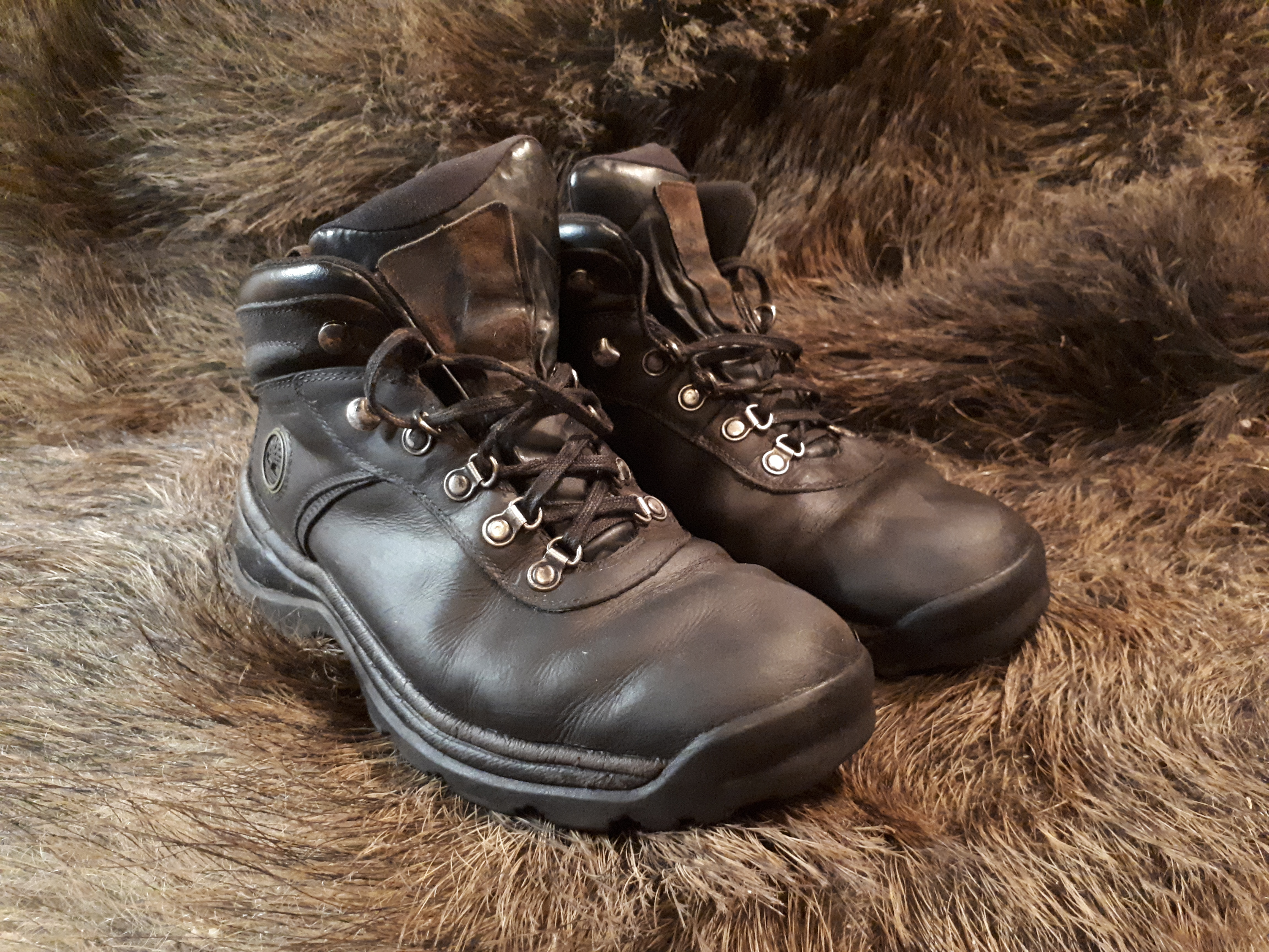 Madala sääreosaga hüppeliigest toestavad matkasaapad.